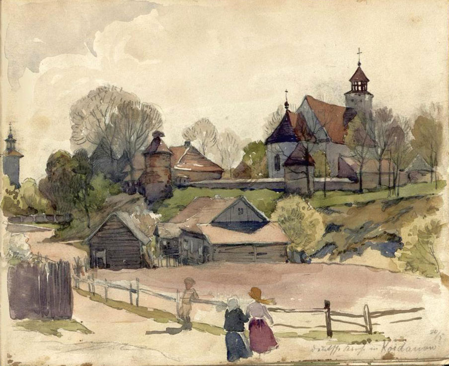 Беларуская (тарашкевіца): Койданаў (Kojdanaŭ). Замак і кальвінскі збор